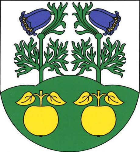 Znak, Hlinná, okres Litoměřice